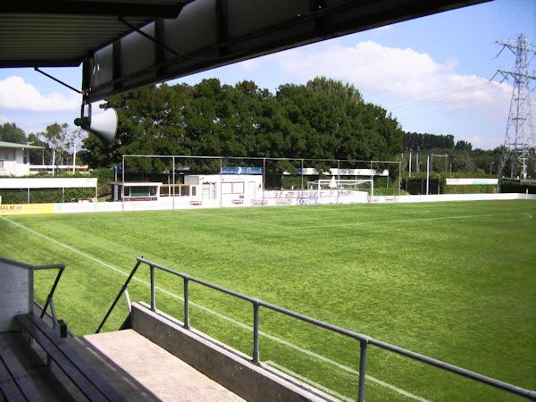 Het hoofdveld van Vitesse Delft, achter het doel bevindt zich de buitenbar en het terras. Aan de linkerkant is een stuk van de kantine te zien.